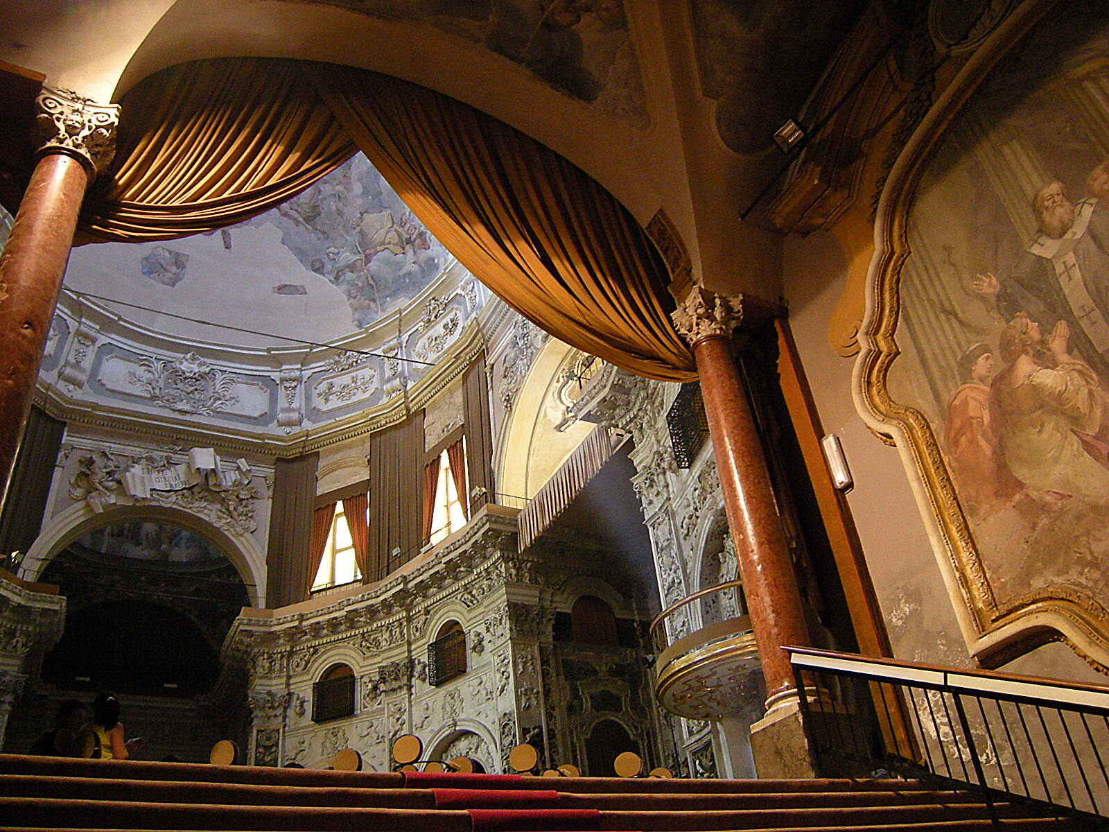 Por fora, simplicíssima. Por dentro belíssima.